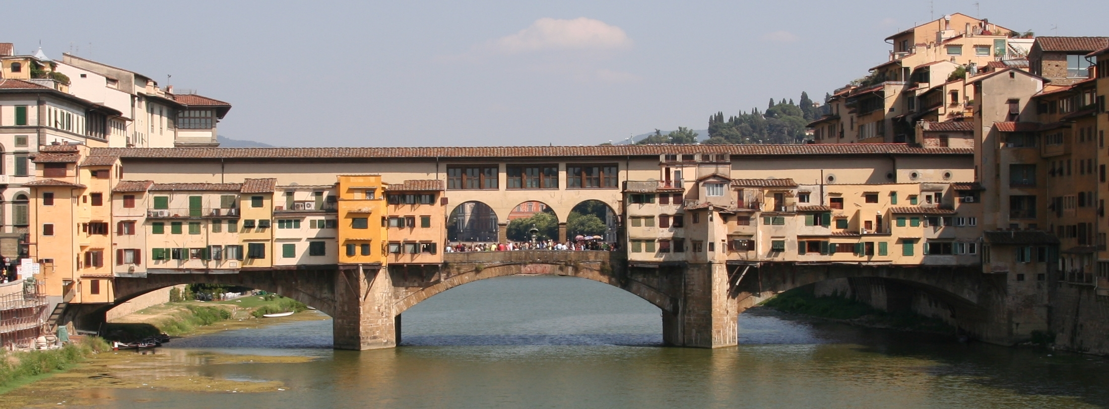 Ponte Vecchio visto dal ponte di Santa Trinita